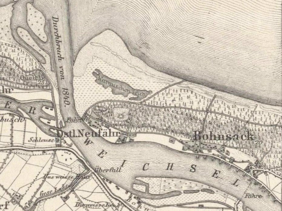 Gdańsk Górki Wschodnie (Östlich Neufähr), Sobieszewo (Bohnsack), Wisła Śmiała i jezioro Karaś na mapie z 1901 r.